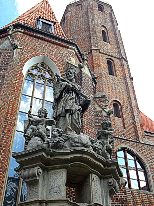 Wrocław, figura św. Jana Nepomucena przed kościołem św. Macieja